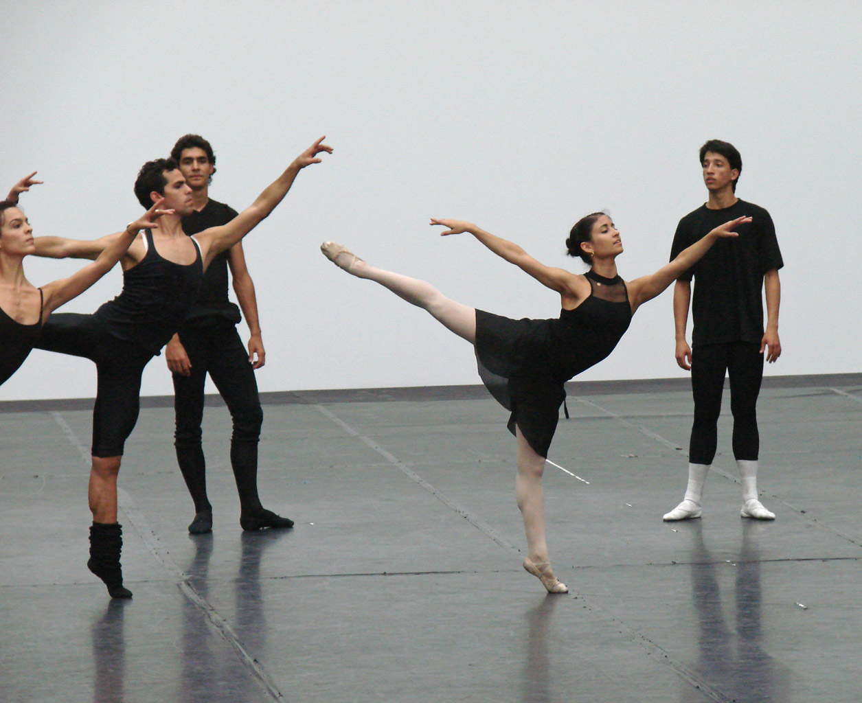 Dans le cadre de la 3e edition du festival “Les étés de la danse de Paris”, le Ballet National de Cuba a présenté deux ballets du répertoire classique, Giselle et Don Quichotte. Cette compagnie a proposé aussi des portes ouvertes permettant d’assister aux cours et à des démonstrations des jeunes danseurs. Le Ballet National de Cuba a été créé en 1948 par Madame Alicia Alonso, danseuse devenue chorégraphe et actuellement directrice artistique de la compagnie, malgré son âge et sa cécité.